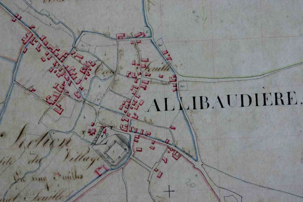 vue de cf titre.